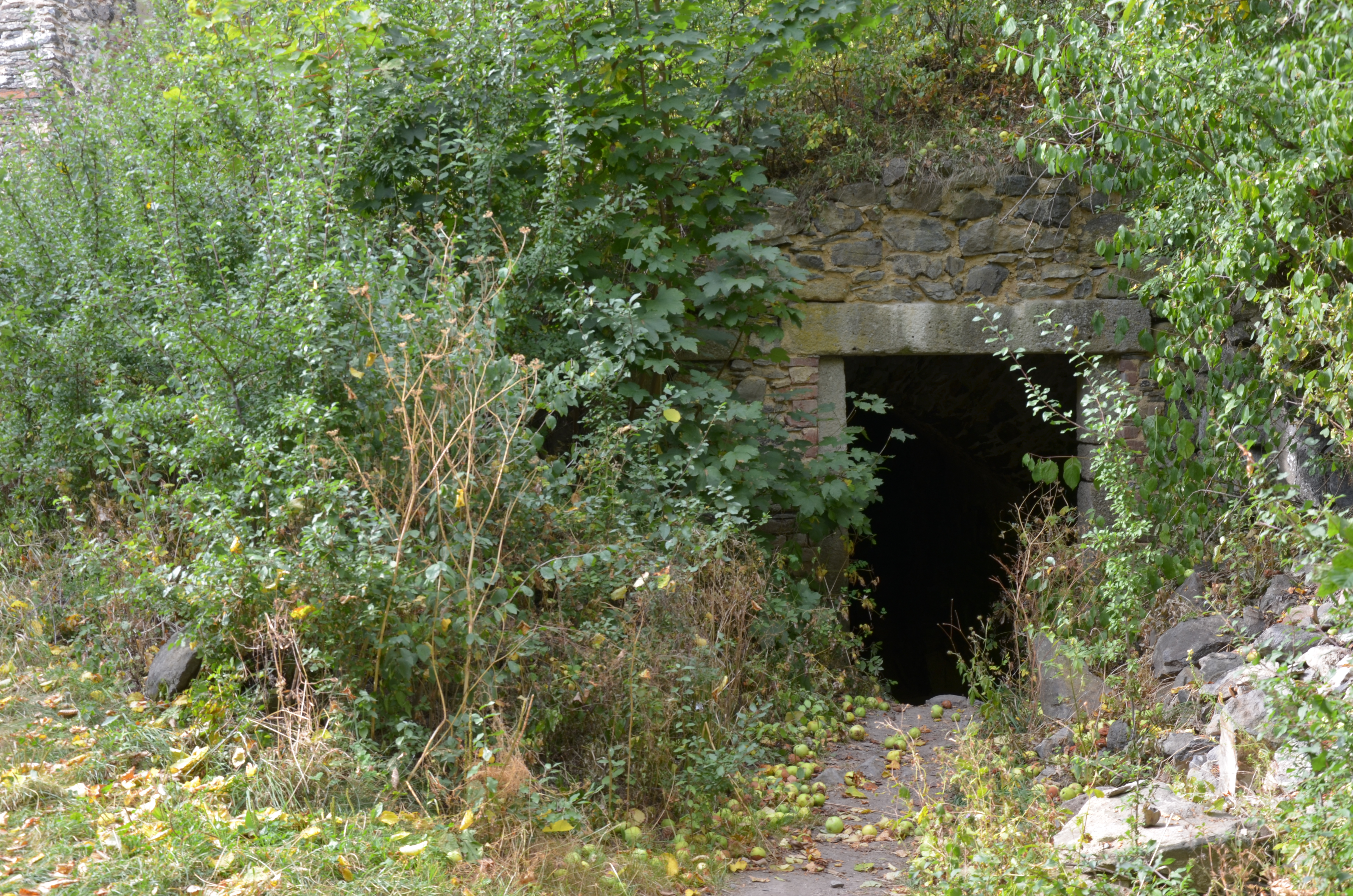 Hrad Krasíkov (Švamberk) s kostelem sv. Maří Magdaleny, zřícenina